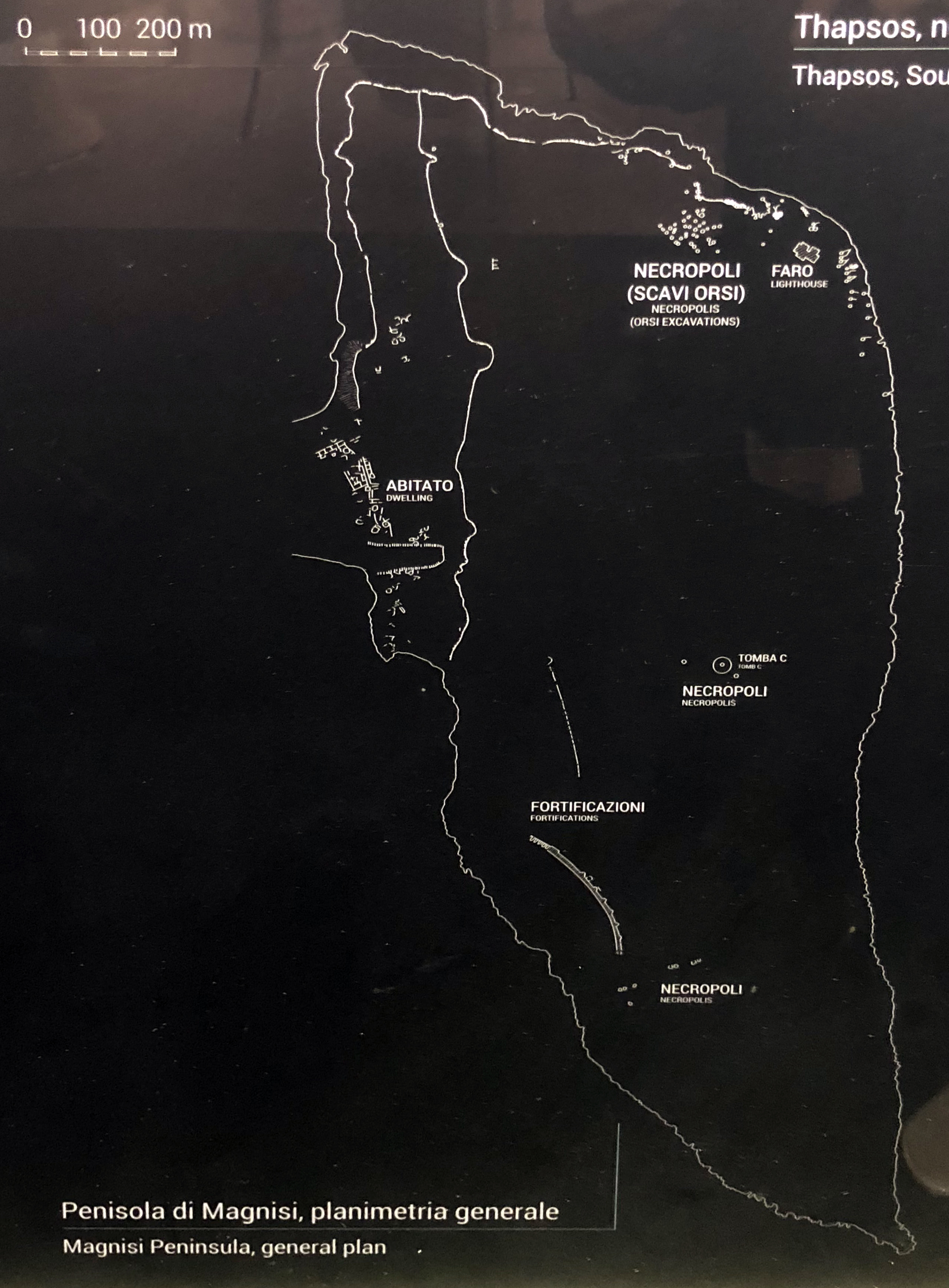 Mappa archeologica di Thapsos